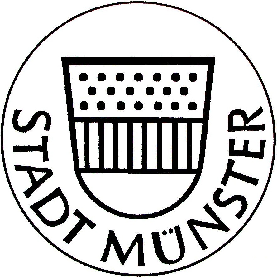 Dienstsiegel der Stadt Münster in Westfalen mit dem überlieferten Stadtwappen als Siegelbild und der Umschrift unten „STADT MÜNSTER“.